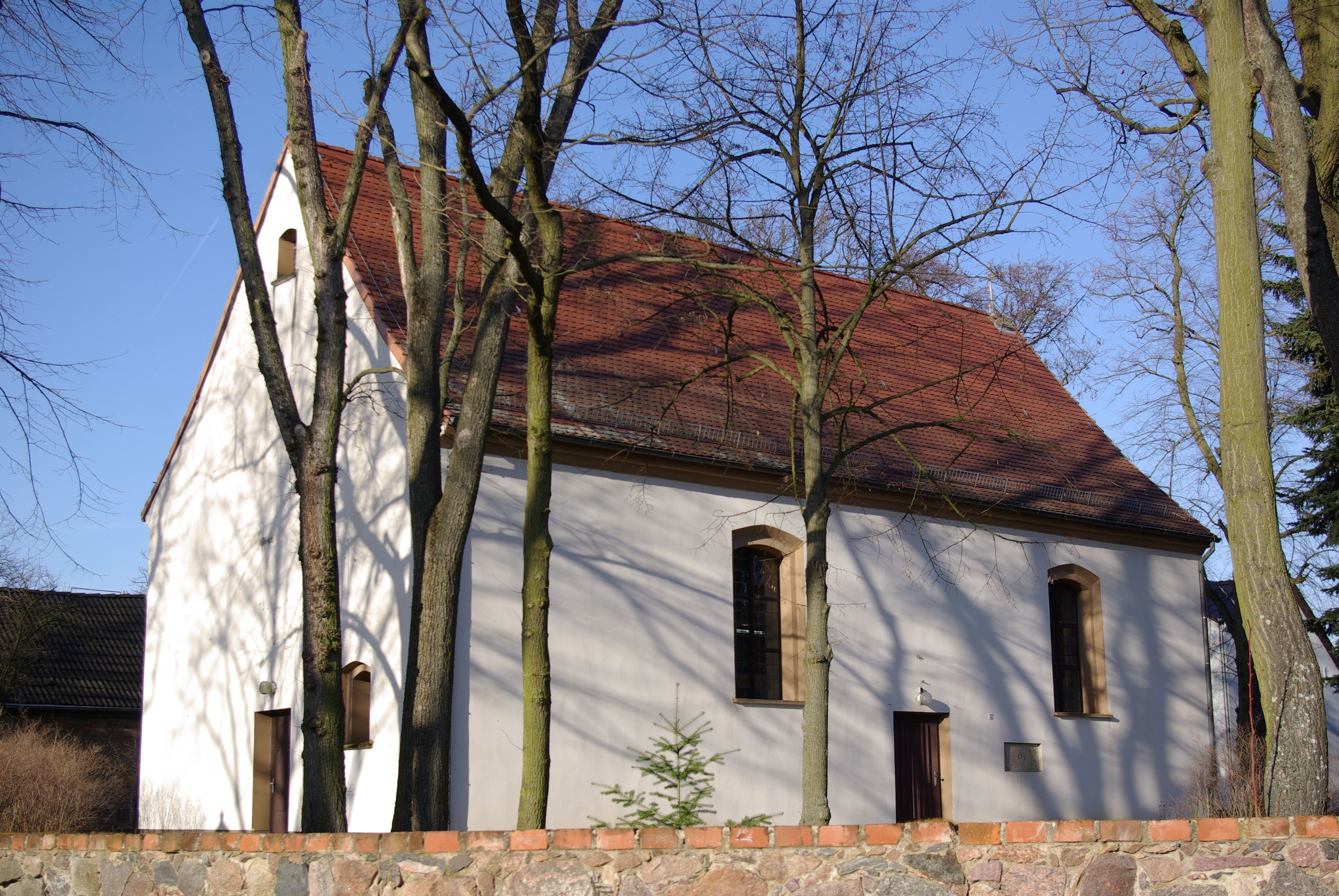 Gräbendorf in der Gemeinde Heidesee in Brandenburg. Teile der Ausstattung der Kirche stehen unter Denkmalschutz.